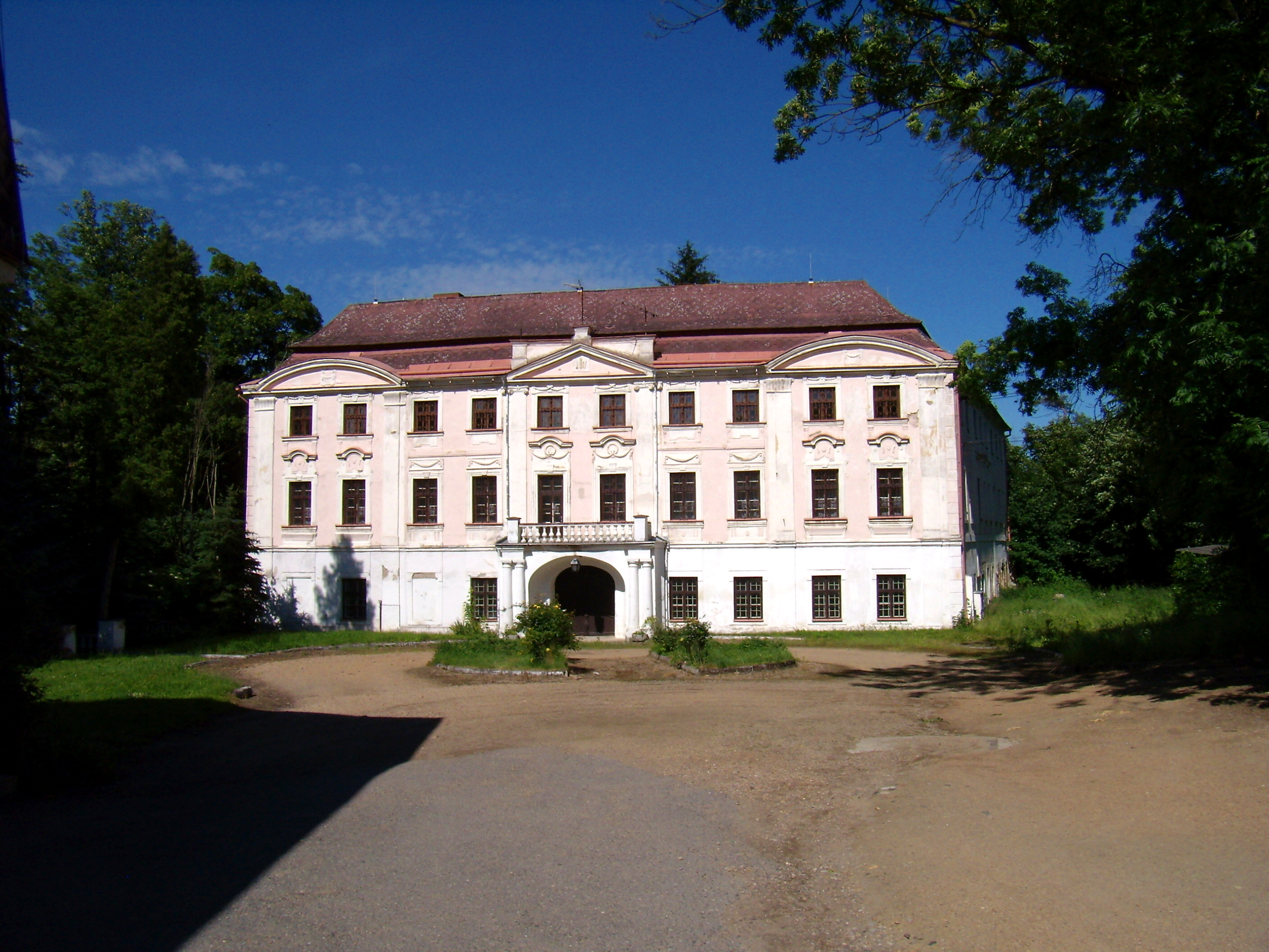 Zámek Zvíkovec